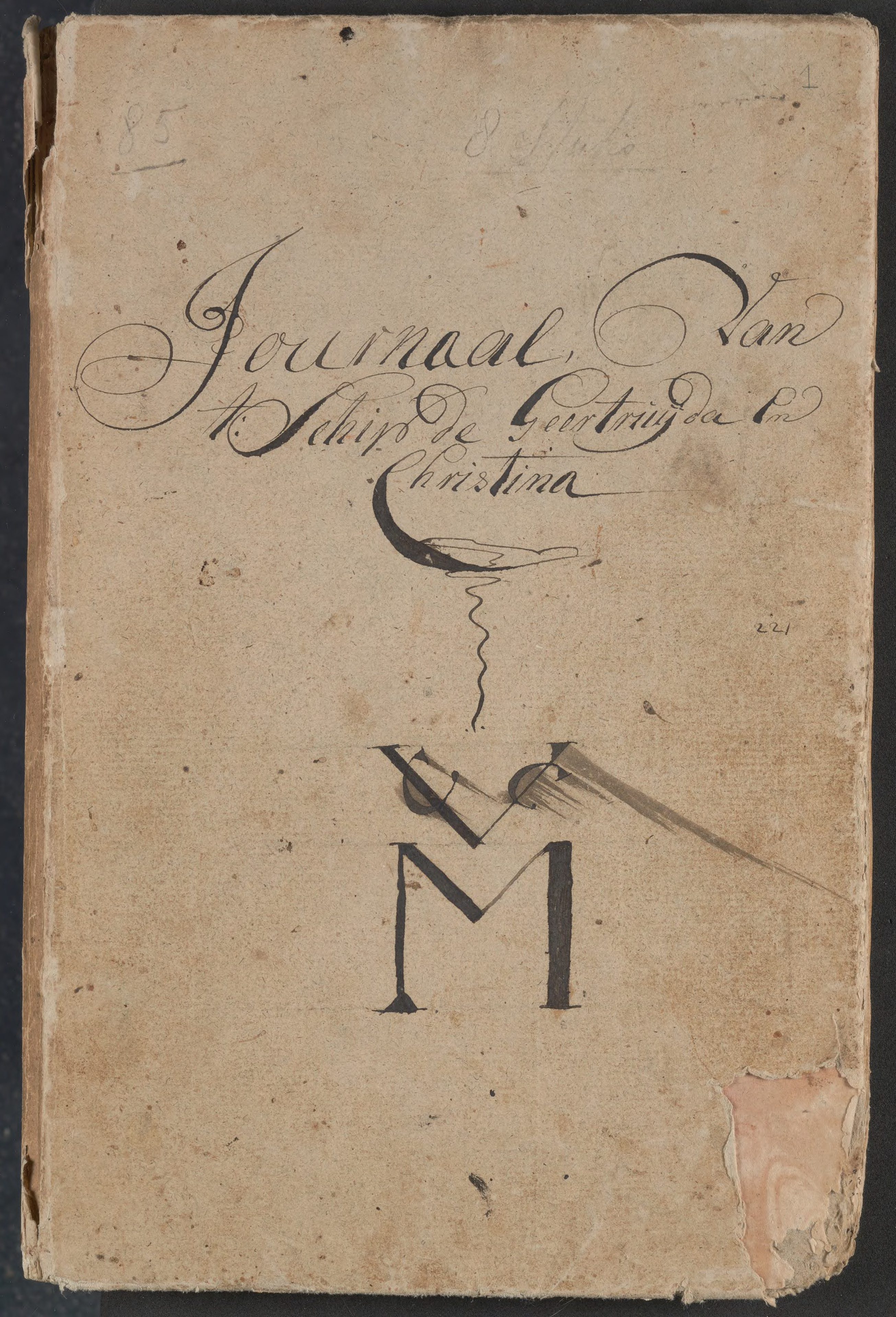 Voorblad van het eerste journaal van het fregat Geertruyda en Christina, 1767-1786 van de Middelburgsche Commercie Compagnie (MCC) op haar 7e reis naar Guinee-Suriname van 29 juli 1783 tot 17 augustus 1785.